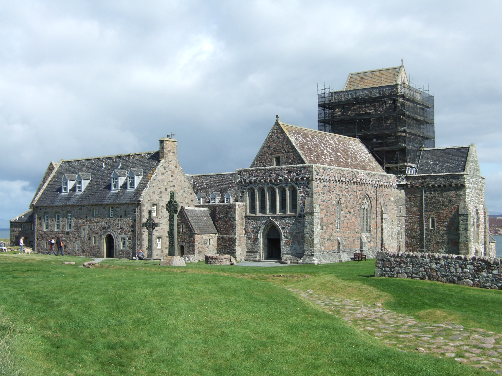 Iona Abbey